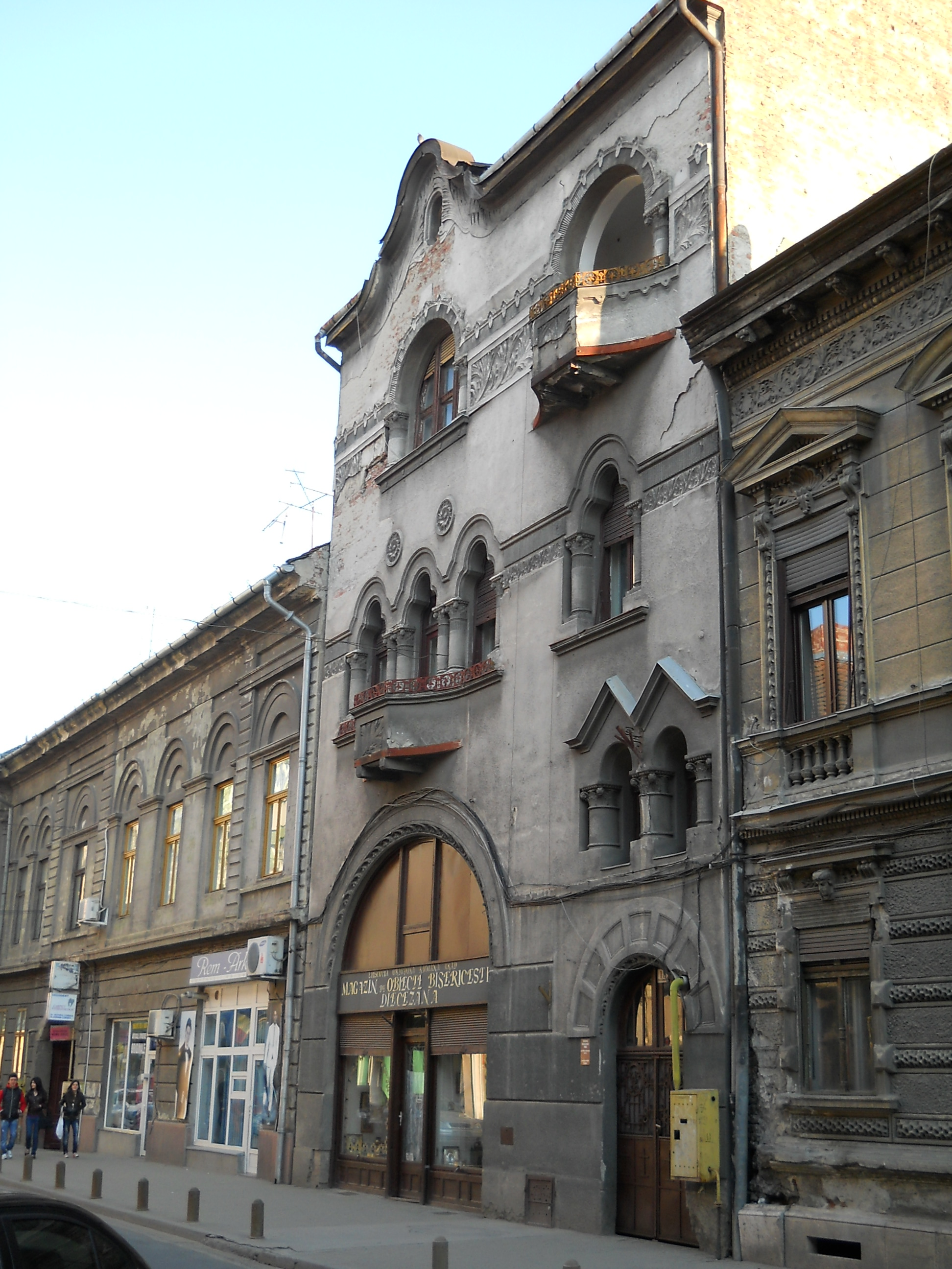 Vedere laterala a clădirii Diecezanei